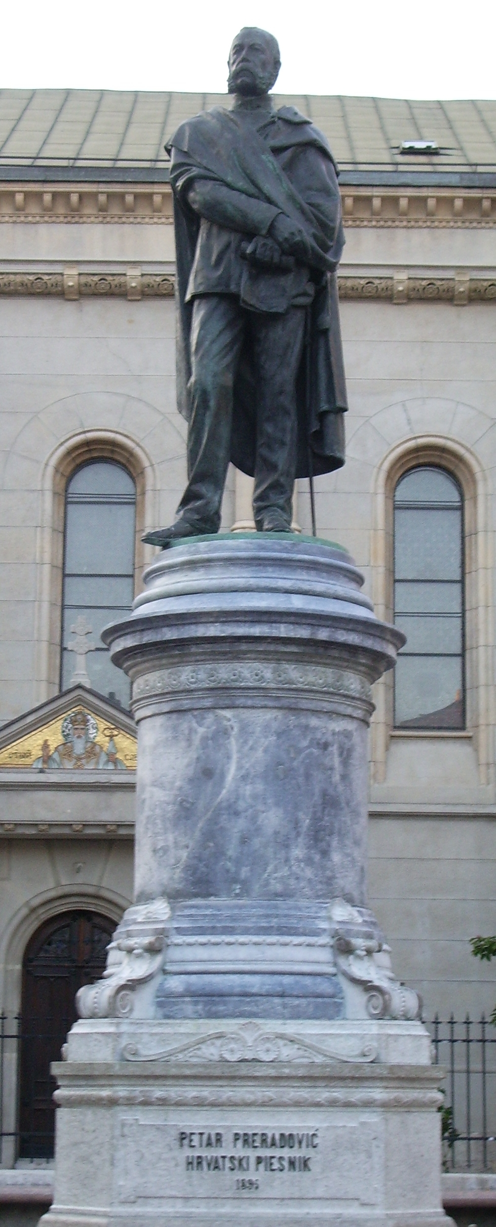 kip Petra Preradovića na Preradovićevom (Cvjetnom) trgu u Zagrebu